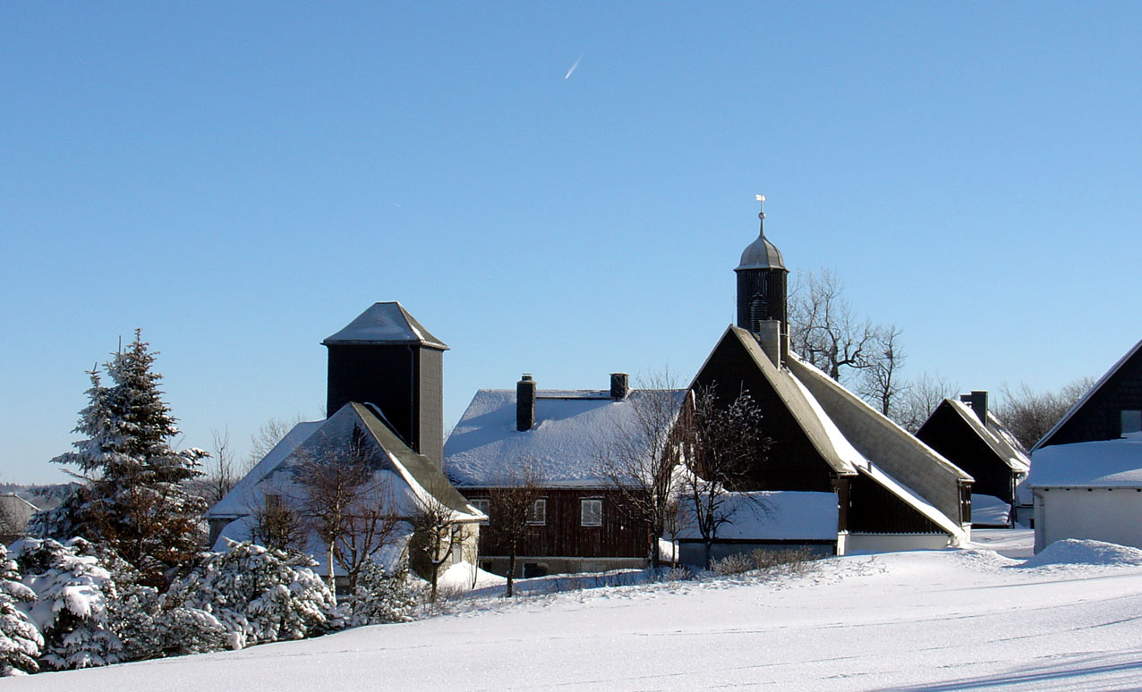 Zinnwald (Erzgebirge), Museum Huthaus